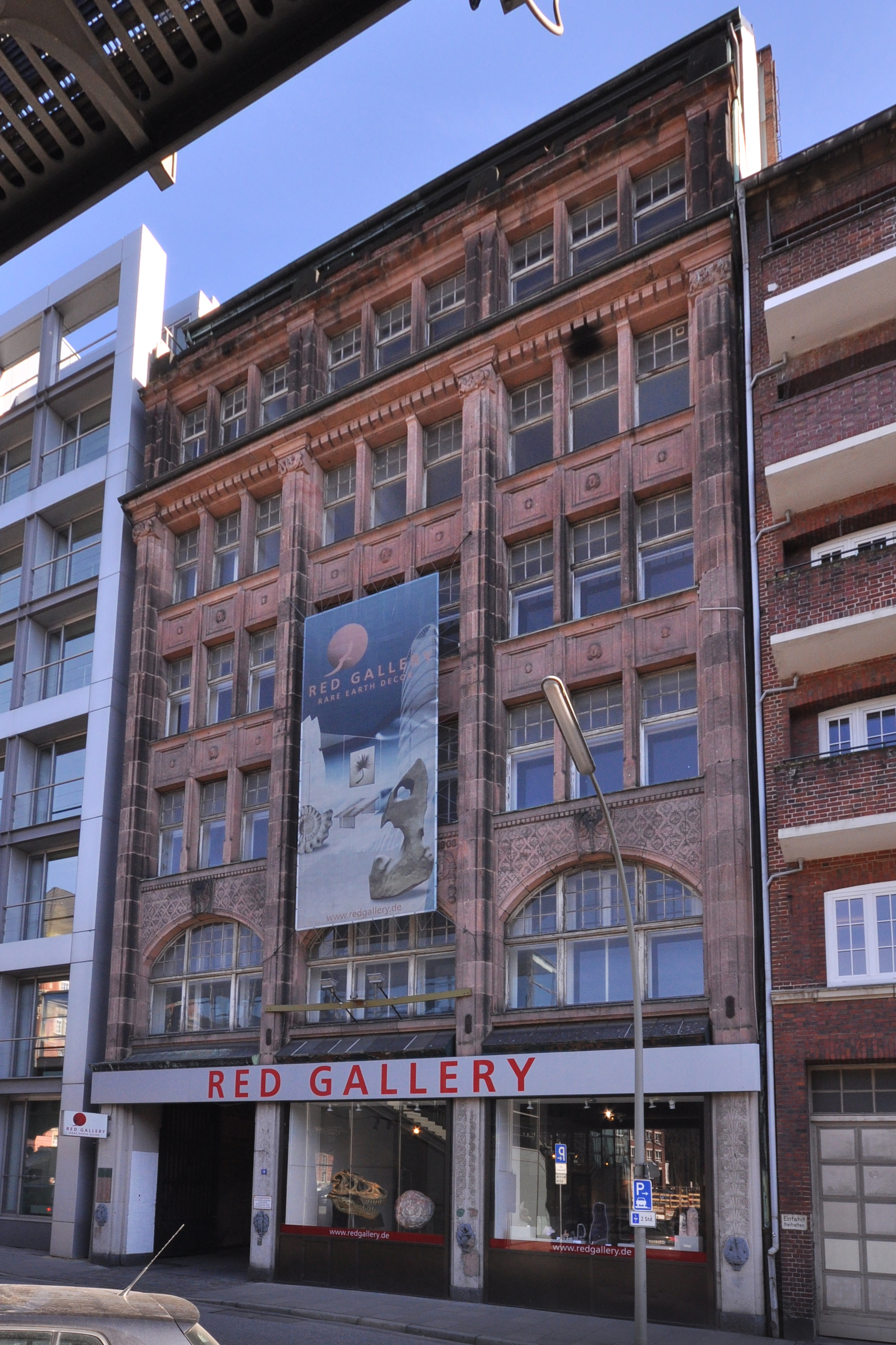 Kontorhaus Rödingsmarkt 19, 1907/08 errichtet. This is a photograph of an architectural monument.